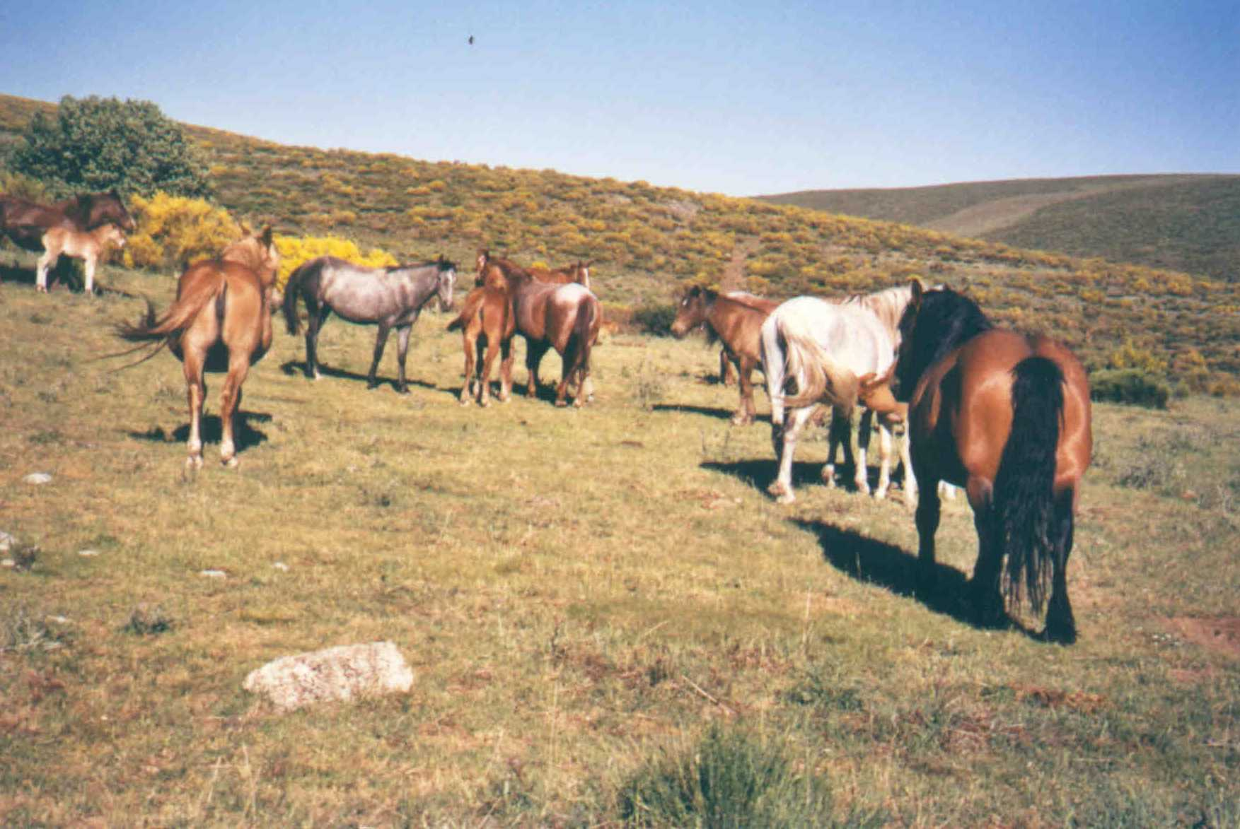 CABALLOS PASTANDO EN LA HERGUIJUELA (SAN JUAN DE GREDOS; ÁVILA; ESPAÑA)